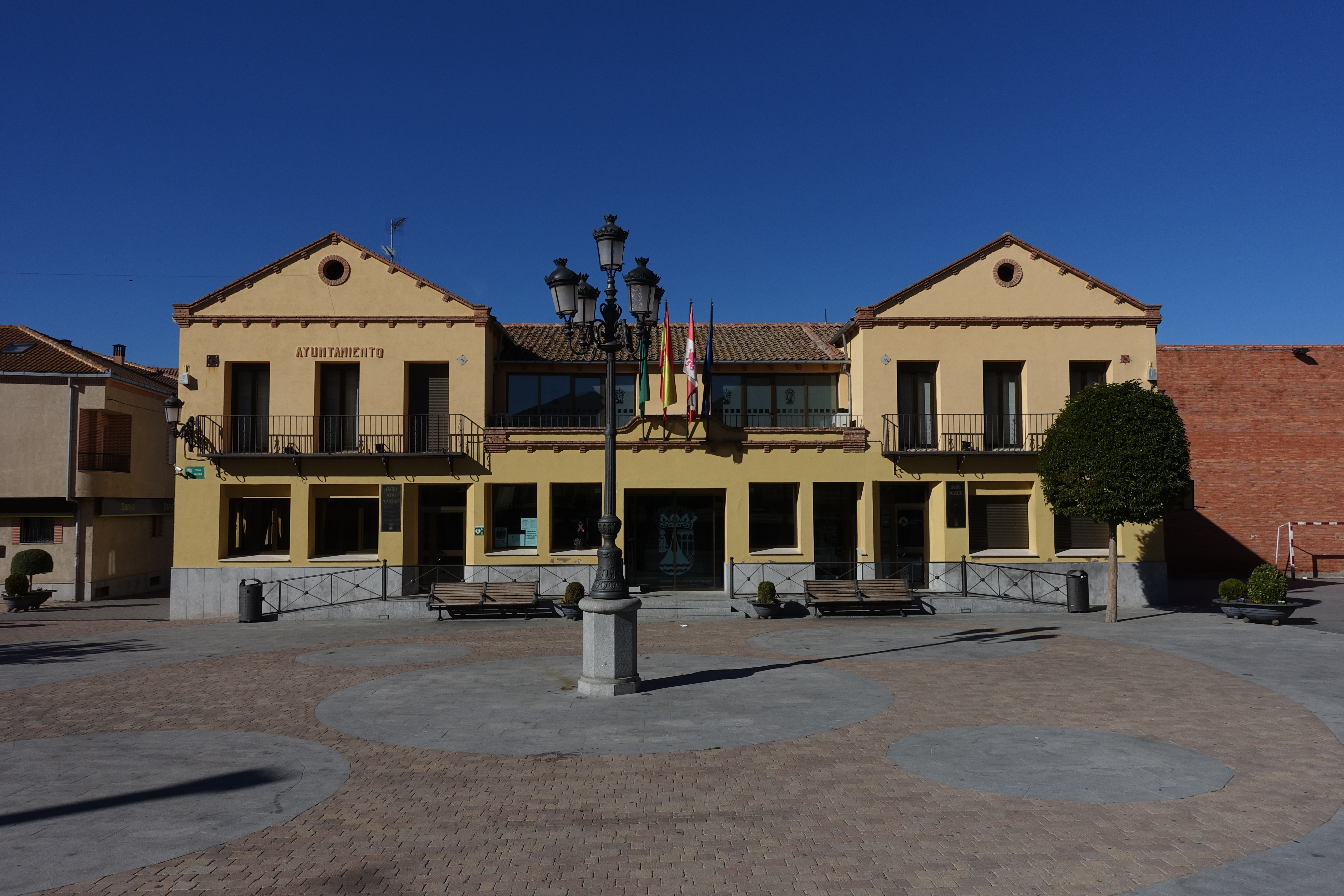 Casa consistorial de Valverde del Majano (Segovia, España).